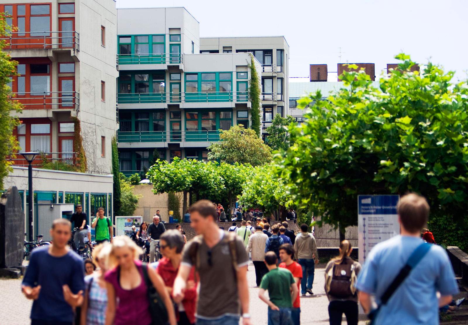 Zentrale Magistrale der Heinrich-Heine-Universität Düsseldorf